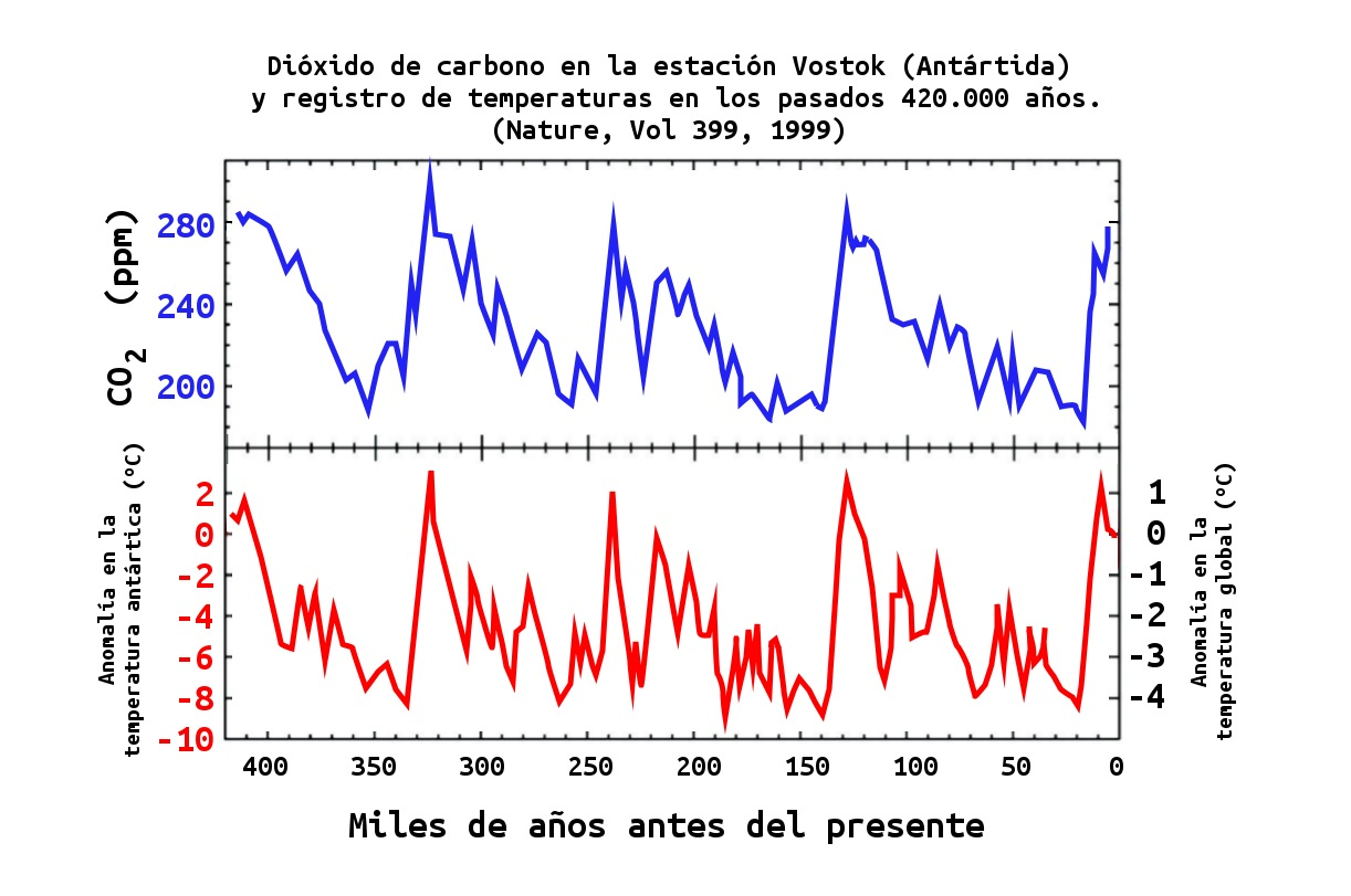 Evolución de la concentración de dióxido de carbono en la estación Vostok (Antártida) y los cambios en la temperatura de la Antártida y de la Tierra en los últimos 420.000 años.